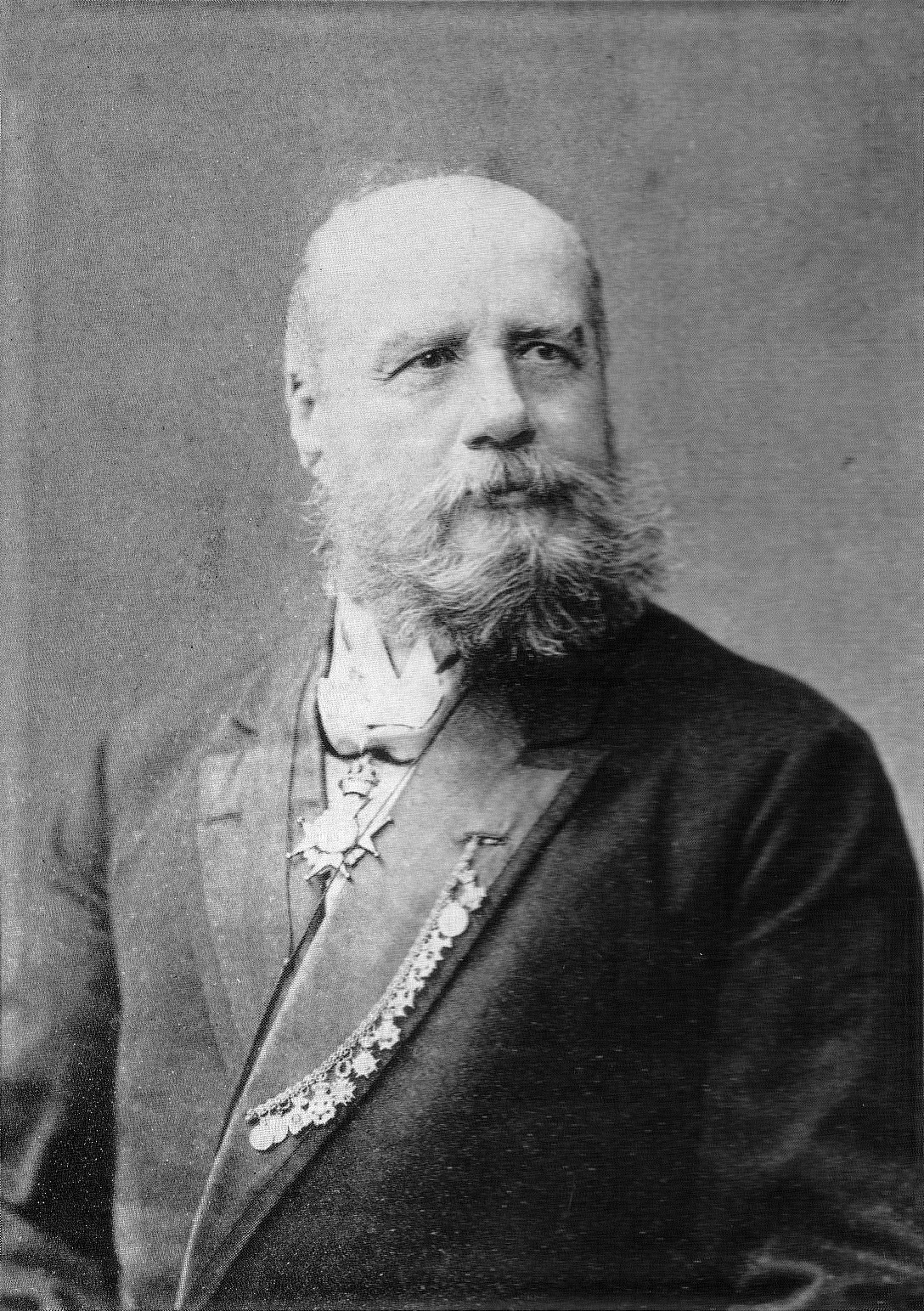 Photography of Adolf Pernwert von Bärnstein